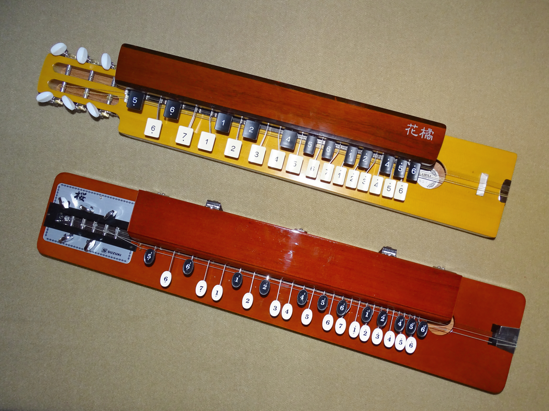 Taisho Koto - Japanisches Instrument, entwickelt im Jahr 1912. Hersteller: Suzuki (vorne), Kawai (hinten). Es handelt sich bei diesem Instrument um eine bundierte Kastenzither, bei der die Saiten nicht mit den Fingern, sondern mit einer schreibmaschinenähnlichen Tastatur abgegriffen werden. Andere Bezeichnungen und Schreibweisen: Taishokoto, Taishogoto, Taisyo Koto, Nagoya-Harfe, Nardan-Harfe. Japanisch: 大正琴